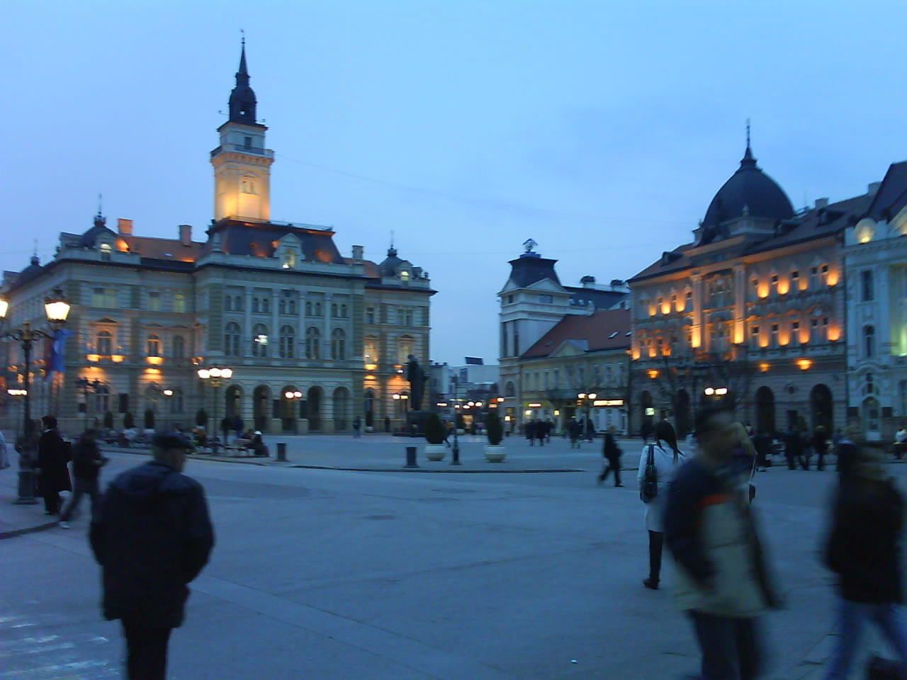 Трг слободе и Милетићев споменик у Новом Саду